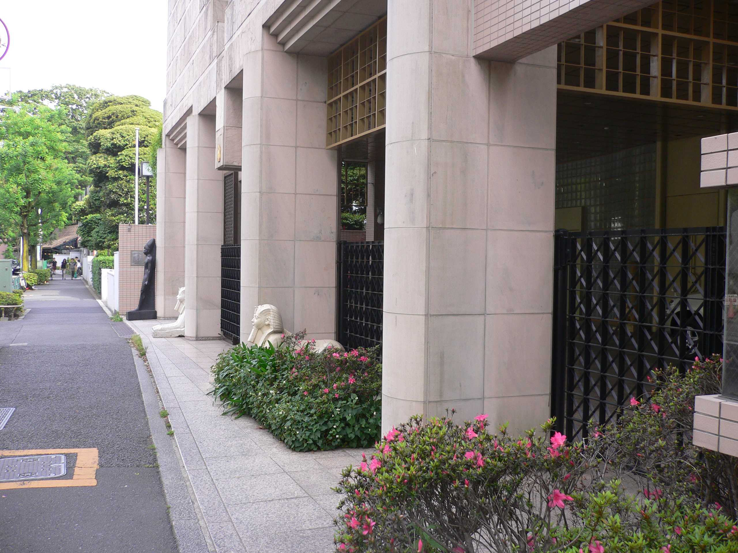 Egypt Embassy Daikanyama